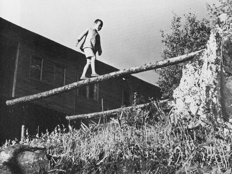 Chiharu Igaya